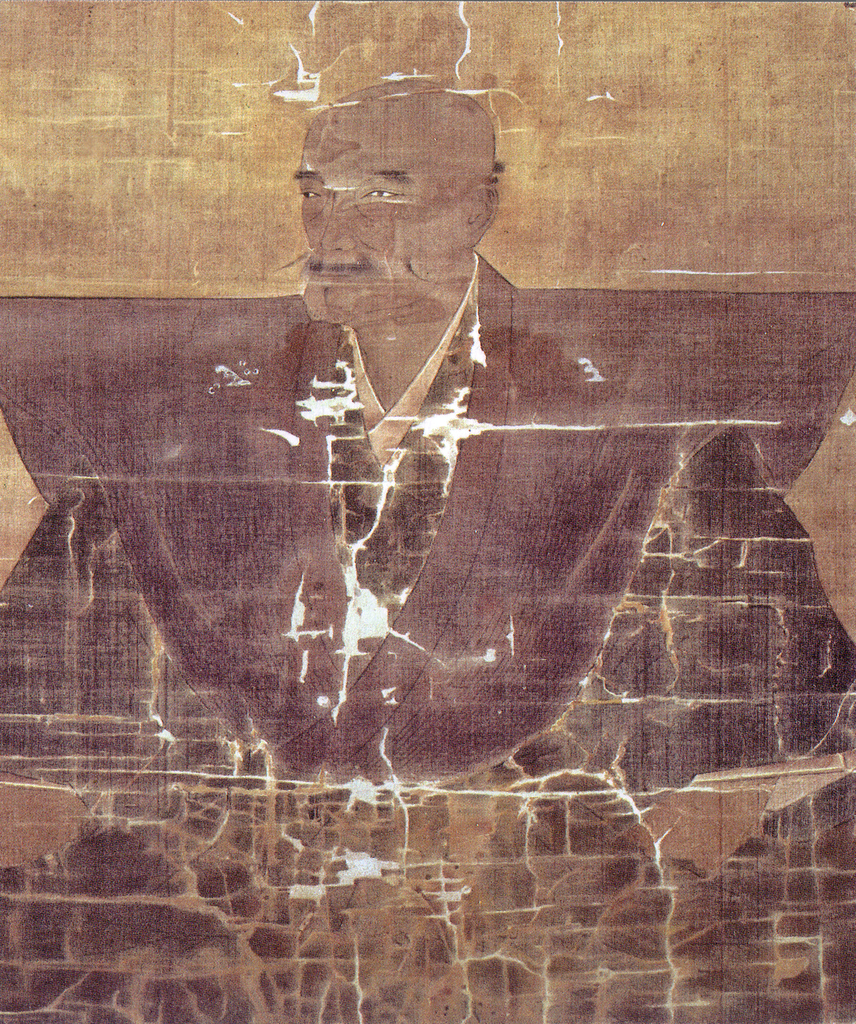 斎藤道三像（一部）